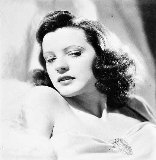 Eileen O'Hearn